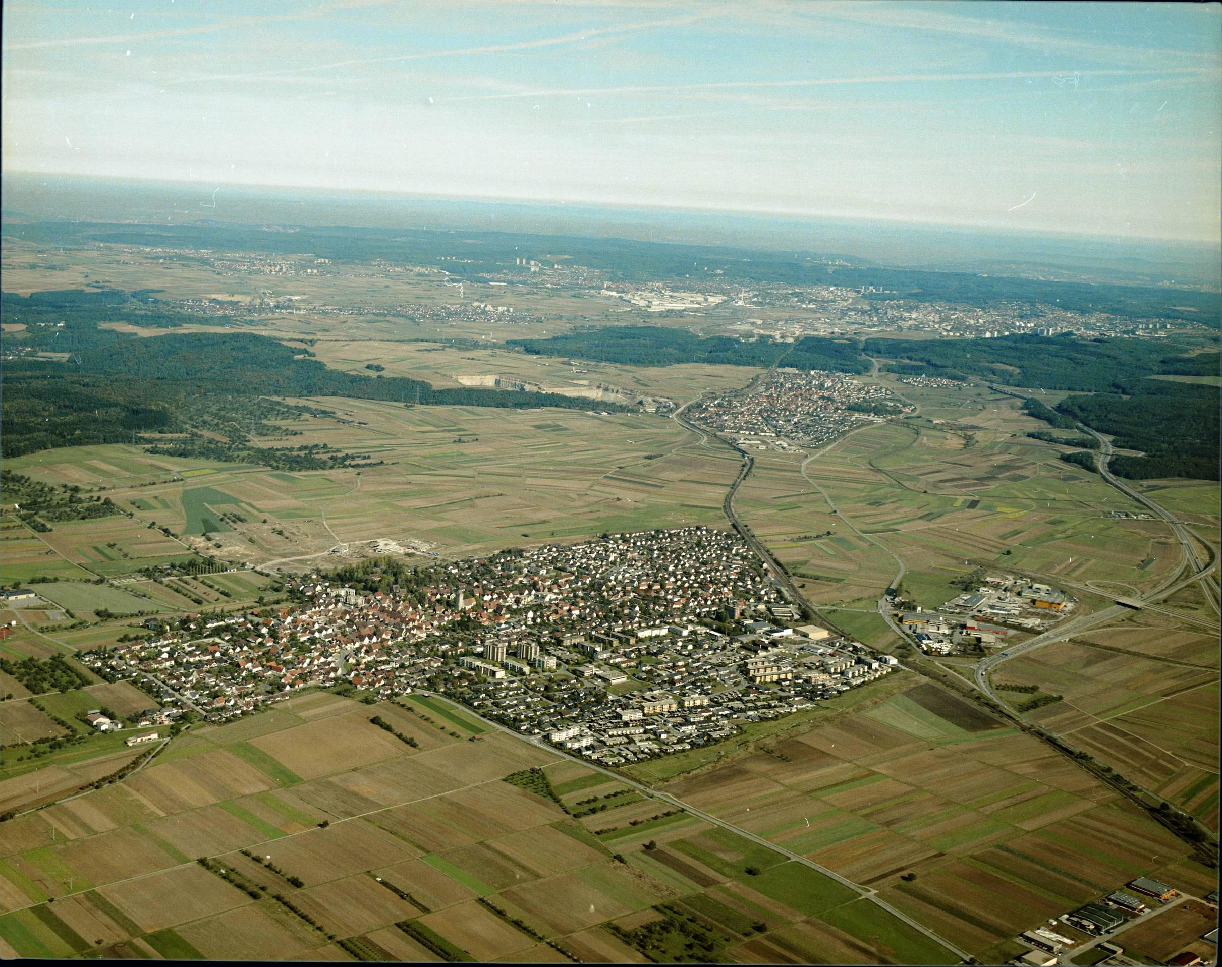 Luftbild von Gärtringen - Staatsarchiv Sigmaringen - Archivalieneinheit N 1/96 T 1 Nr. 487